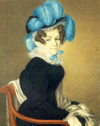 Лев Дмитриевич Крюков (1783-1843). Портрет Александры Андреевны Фукс. Казань, 1828. Бумага, акварель. 19х16,5.